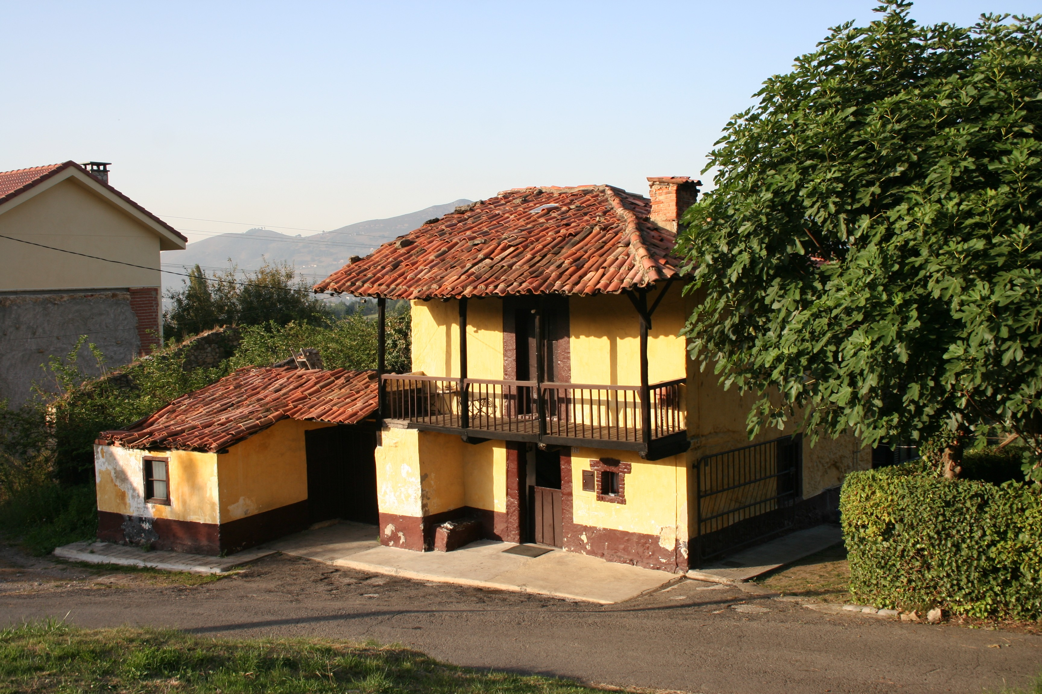 Casa típica de Asturias en las afueras de Oviedo